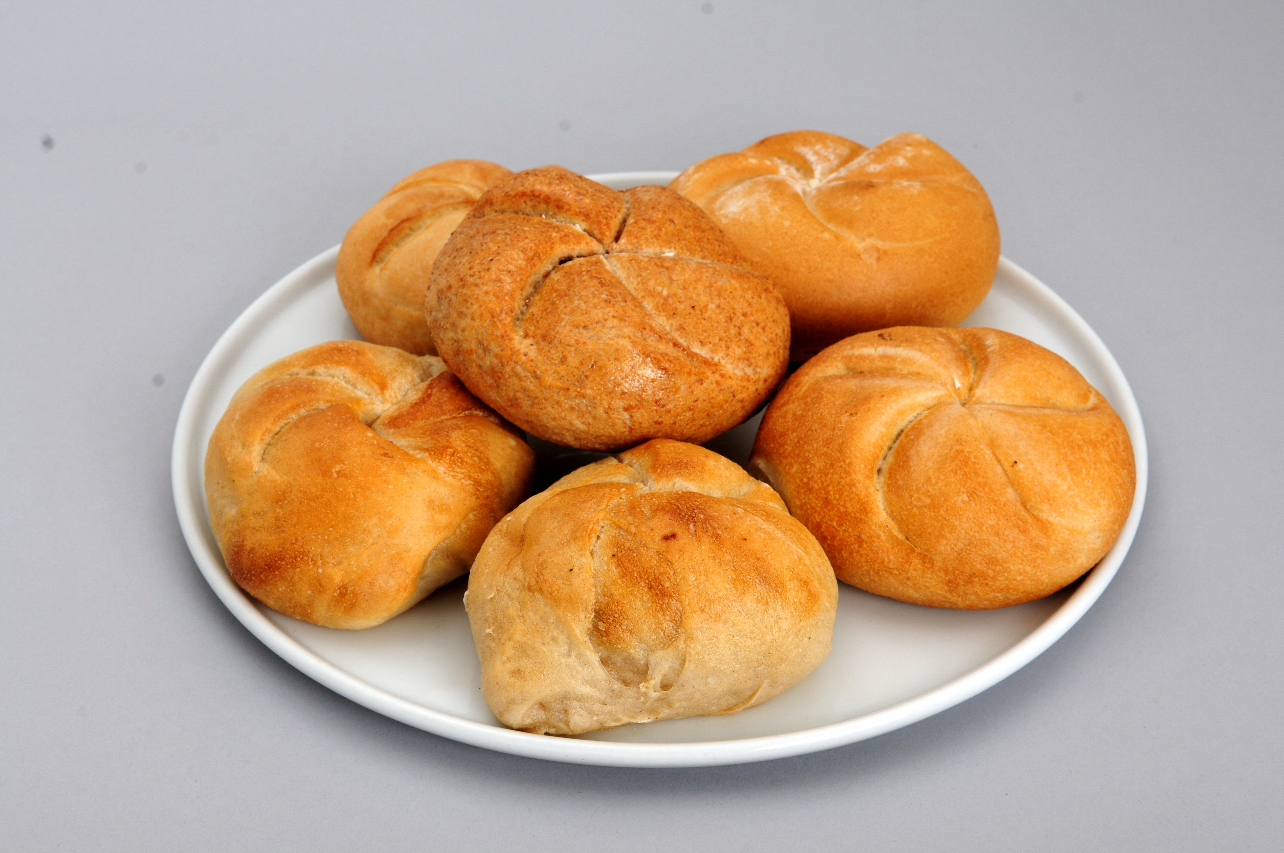 Treffen der Redaktion Essen und Trinken ion Wien